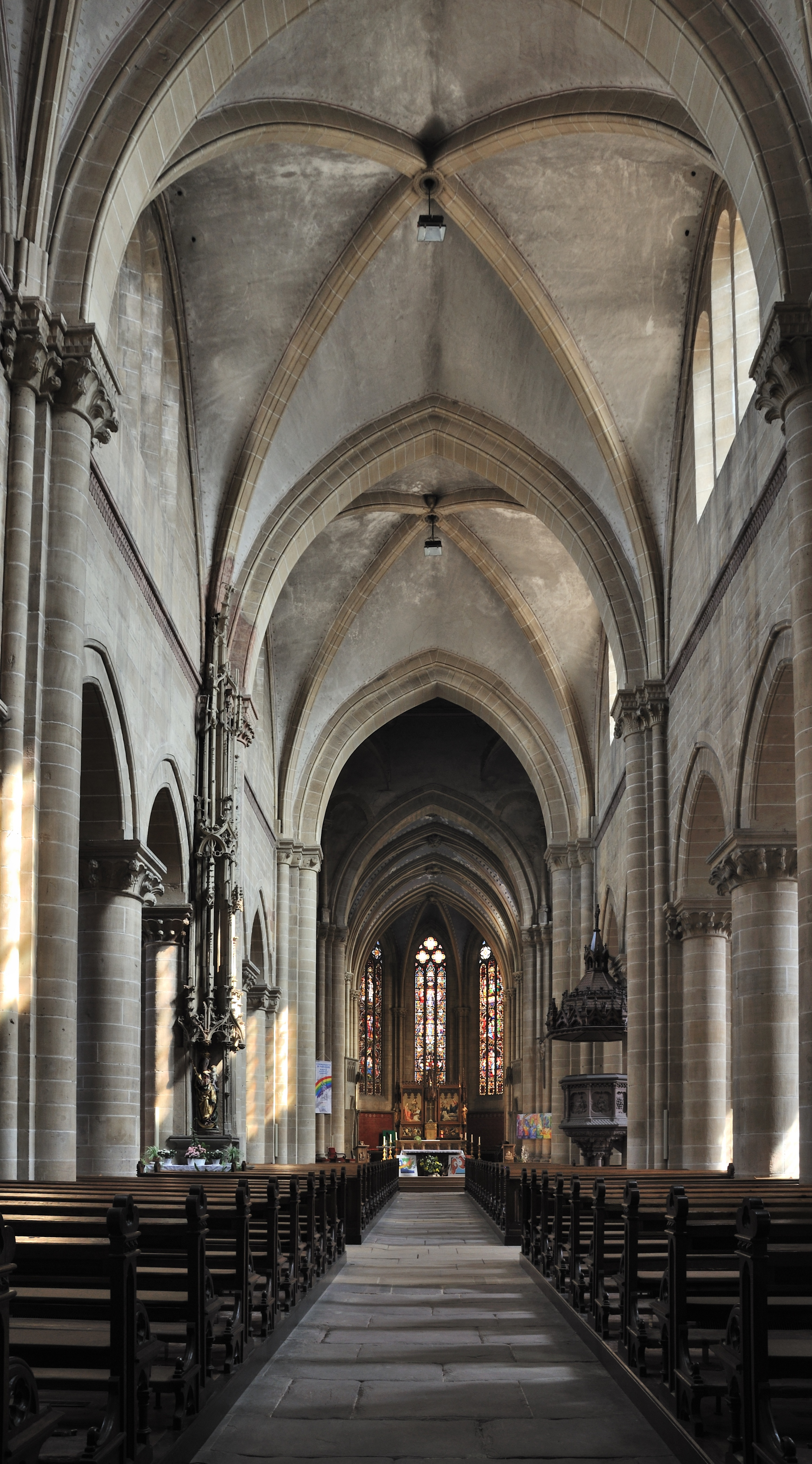 Mariä-Himmelfahrt-Kirche: Kirchenschiff (innen)